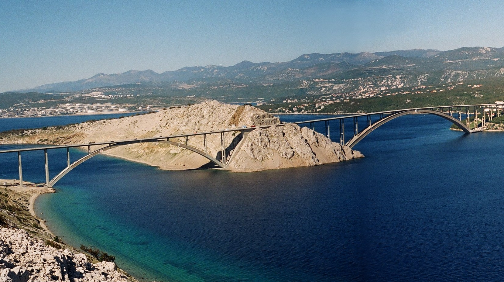 Panorama sur le Pont de Krk et ses environs, depuis l'île de Krk